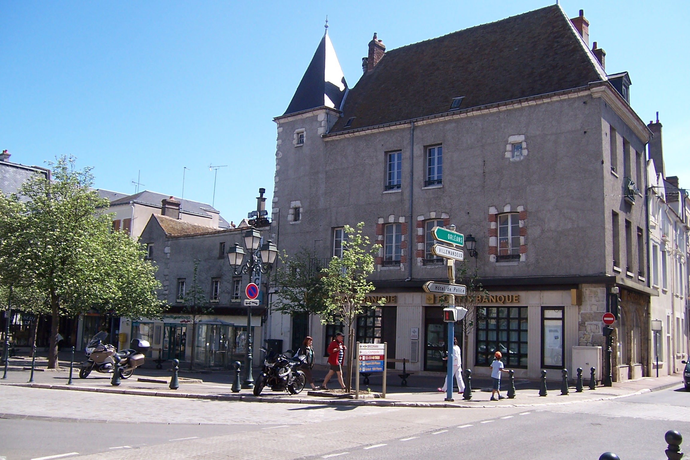 France - Loiret - Montargis - Place Mirabeau (2/2)